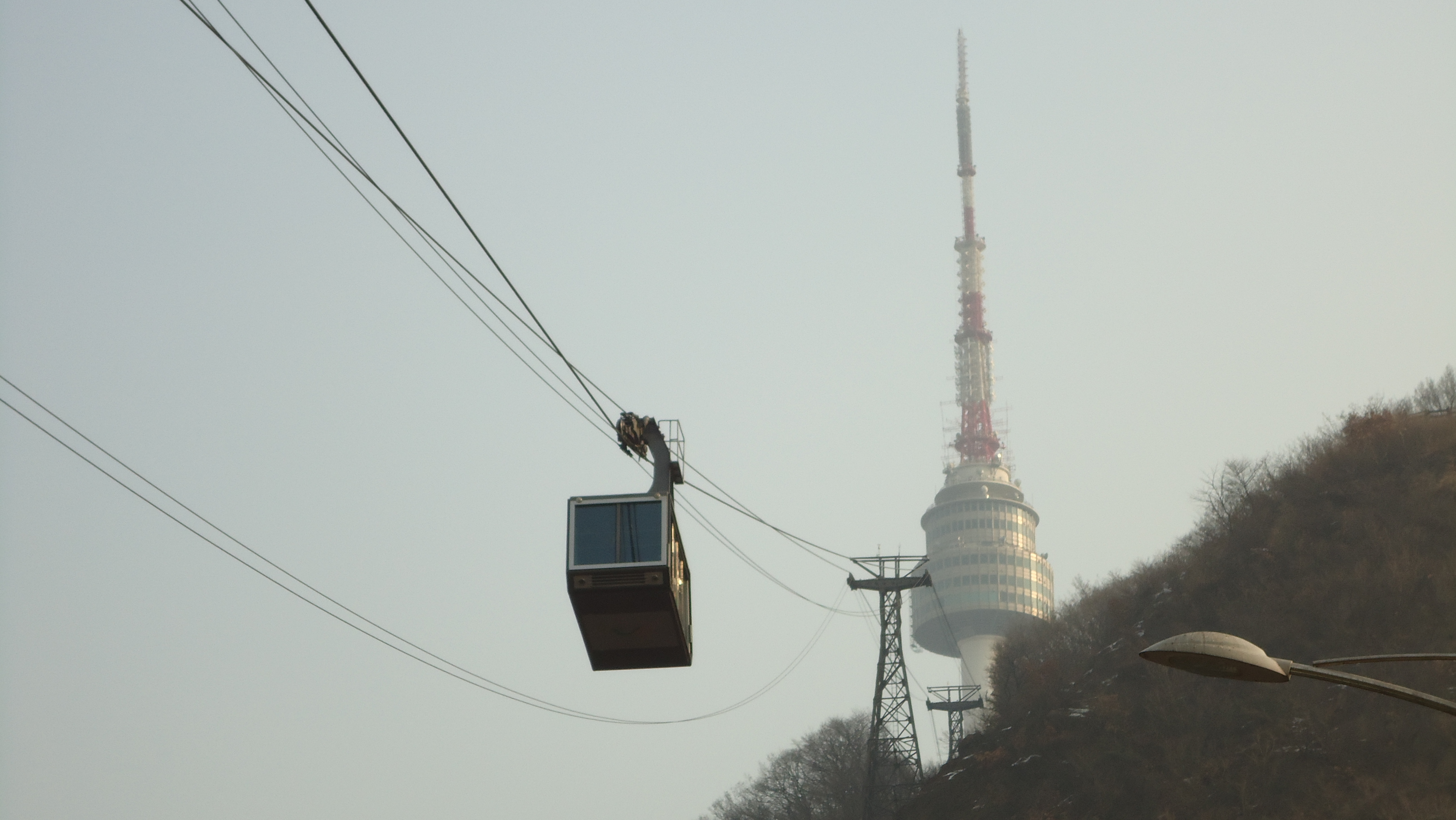 서울역 근처에 있는 새로 개통한 남산 케이블카